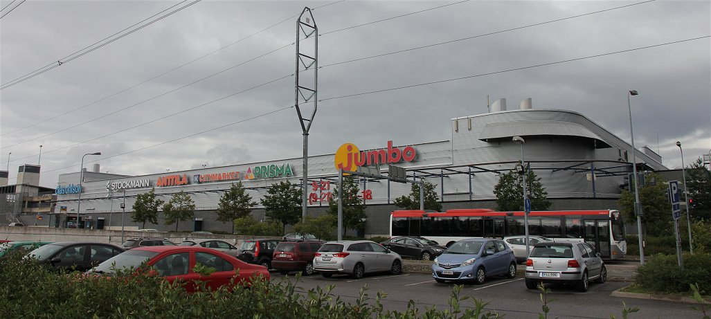 Kauppakeskus Jumbo Vantaan Pakkalassa, Kehä III:n eteläpuolella, Vantaanportin yritysalueella. Vuonna 2012 Jumbo nousi Suomen suurimmaksi kauppakeskukseksi myyntimäärällä mitattuna.